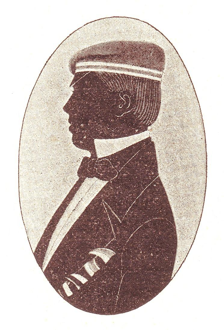 Richard von Volkmann als Corpstsudent